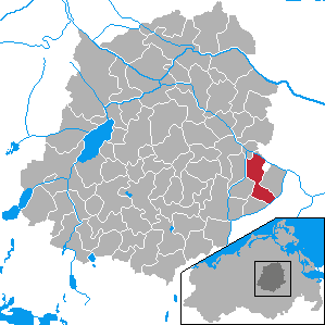 Werder, Landkreis Demmin, Mecklenburg-Vorpommern